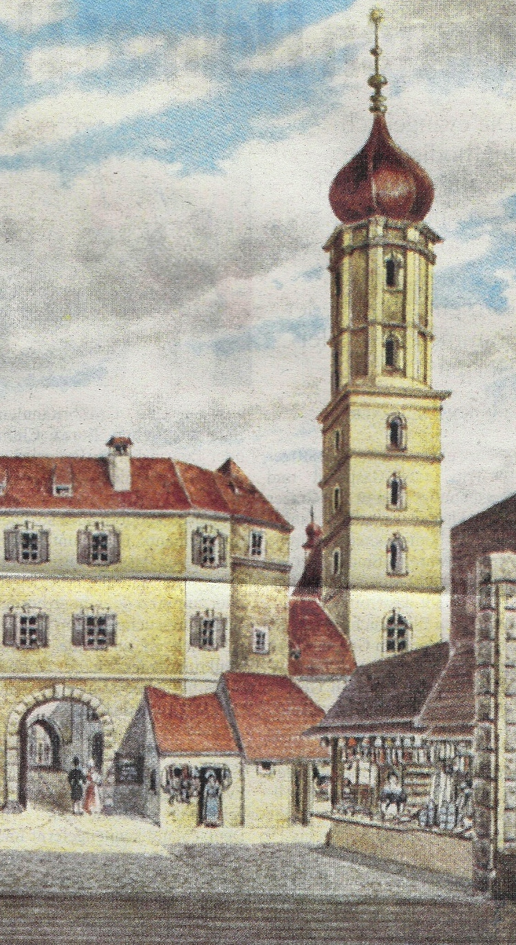 Äußeres und inneres Murtor als Abschluss der Grazer Murgasse mit Franziskanerkirche und Marktständen.